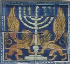 Ehad Haam street, Tel Aviv-Yaffo